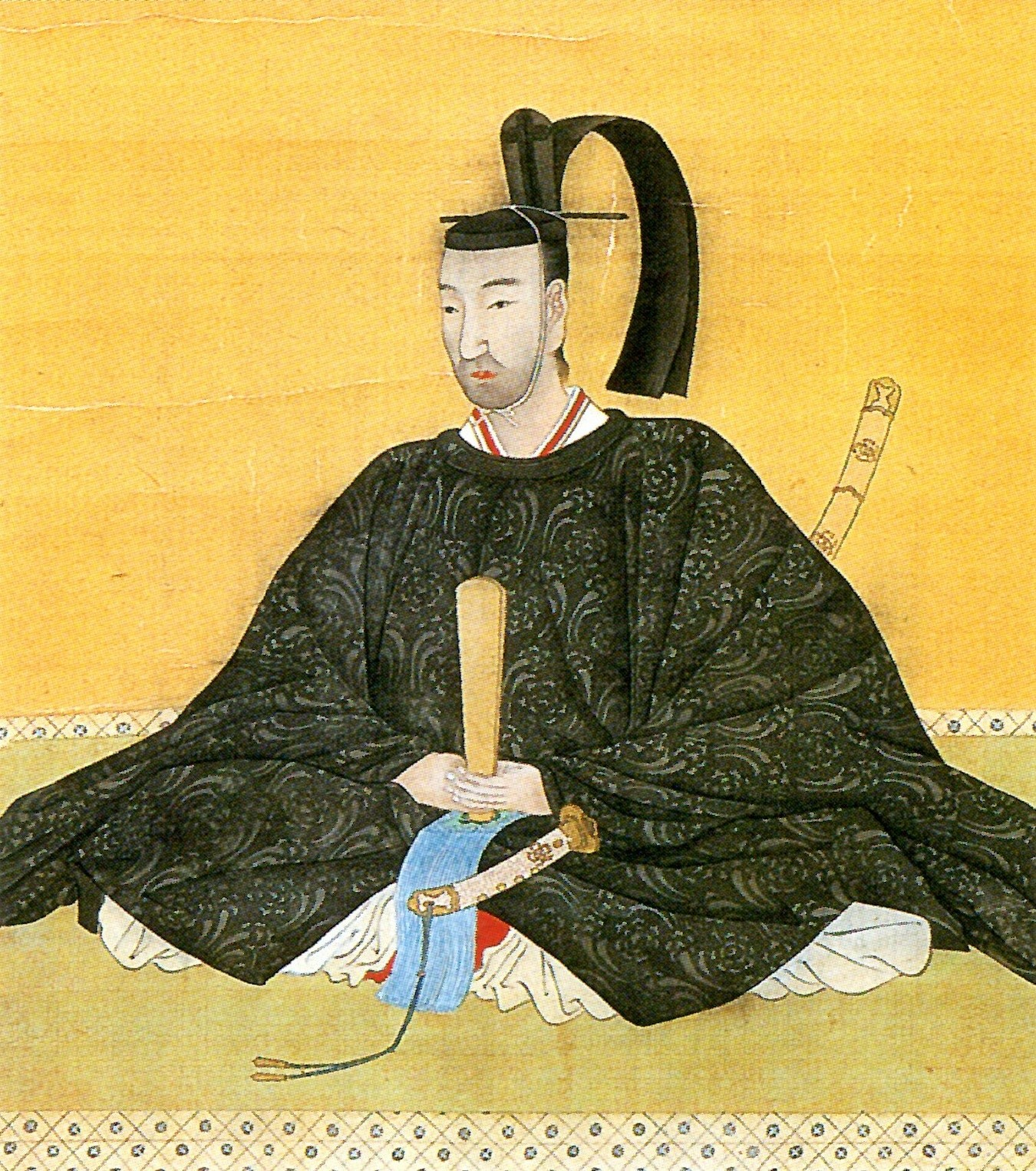 立花鑑門(筑後国柳河藩第7代藩主立花鑑通の長男)の肖像。